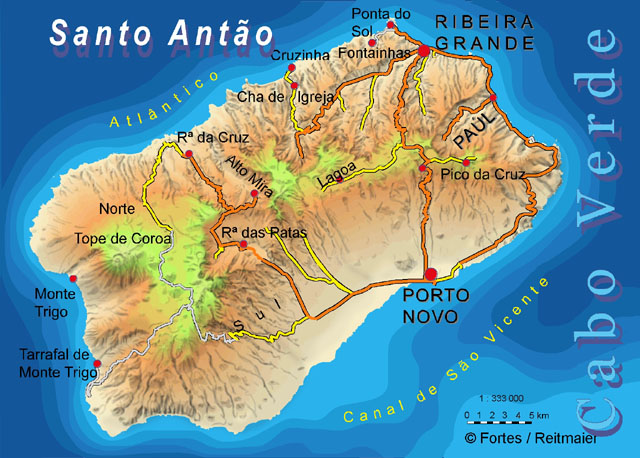 Map of Santo Antão Island - Cabo Verde